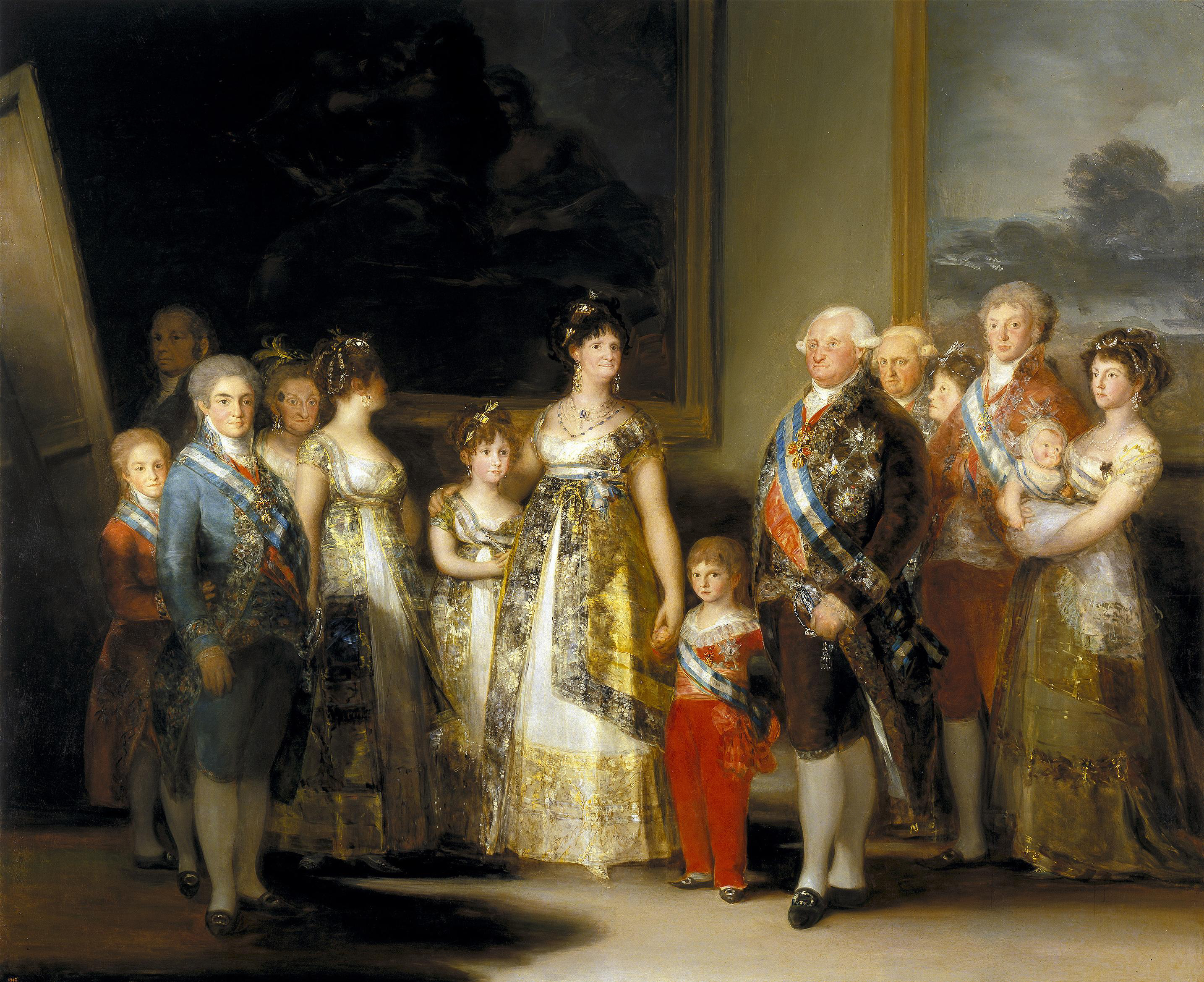 Aparecen Goya, los infantes Carlos María Isidro, Francisco de Paula, Carlota Joaquina, María Josefa, María Luisa, Gabriel Antonio, Carlos Luis. También se observa a Luis de Etruria, esposo de María Luisa. Ésta carga en brazos a su hijo Carlos Luis. Otras figuras son los reyes Carlos IV y María Luisa de Parma, el príncipe Fernando y su esposa María Antonieta.